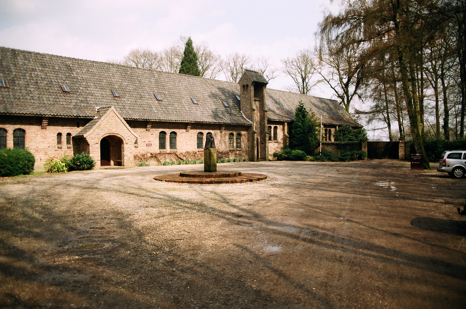 Eigen werk